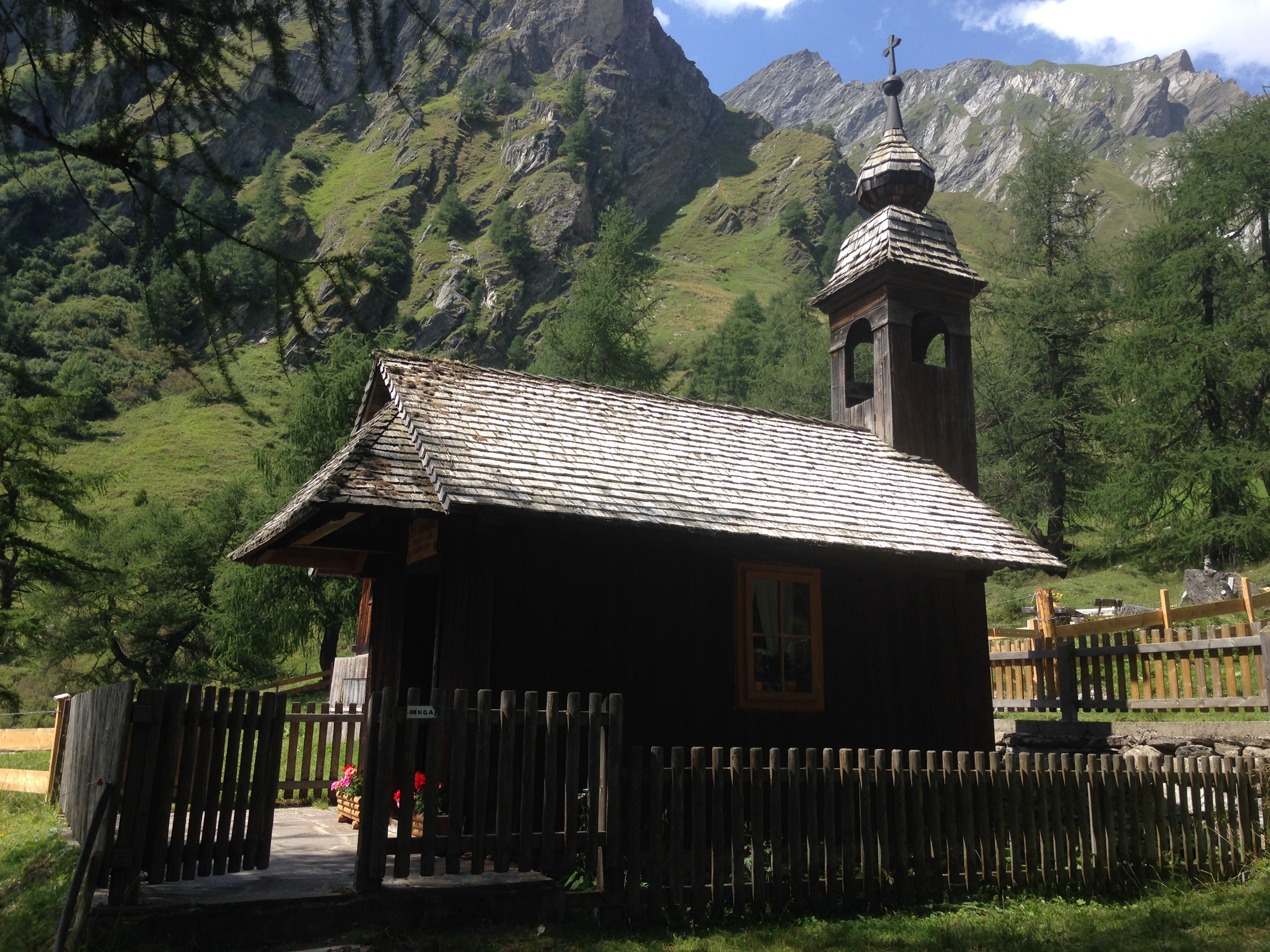 Herz-Jesu-Kapelle ("Ködnitzkirchl") denkmalgeschützte Holzkapelle bei Kals am Großglockner, Bezirk Lienz, Tirol, Österreich The making of this work was supported by Wikimedia Austria. For other files made with the support of Wikimedia Austria, please see the category Supported by Wikimedia Österreich.